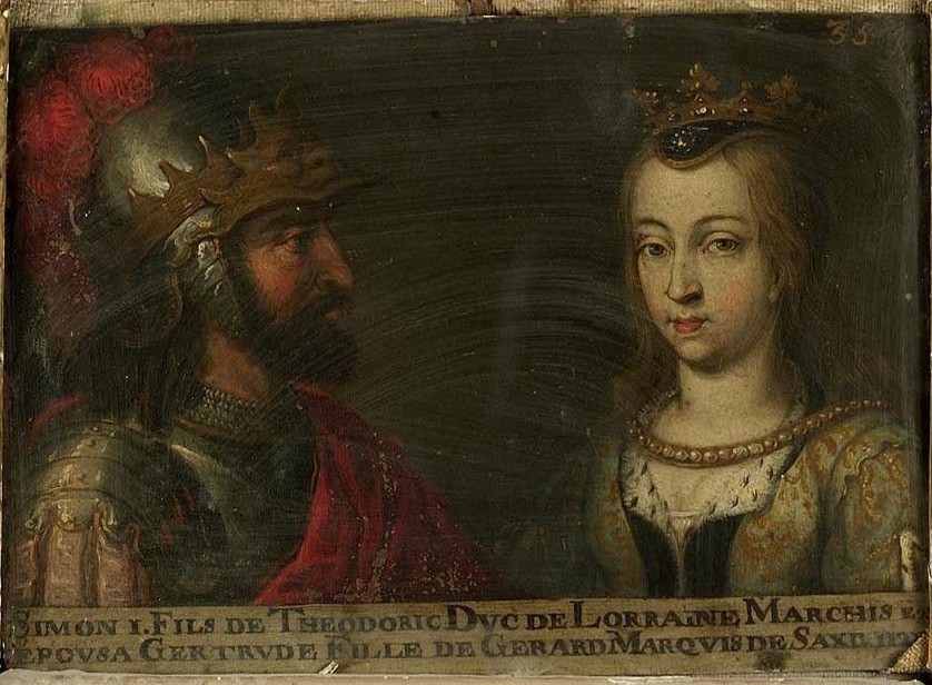 Portrait de Simon Ier, duc de Lorraine de 115 à 1139, et de son épouse Gertrude de Saxe. Ce tableau fait partie d'une suite d'une soixantaine de double-portraits représentant les ducs et duchesses de Lorraine ainsi que leurs ancêtres supposés. La légende est erronée car l'épouse de Simon Ier était Adélaïde de Louvain. Musée des Offices, Florence (Inv. 1890, 669)